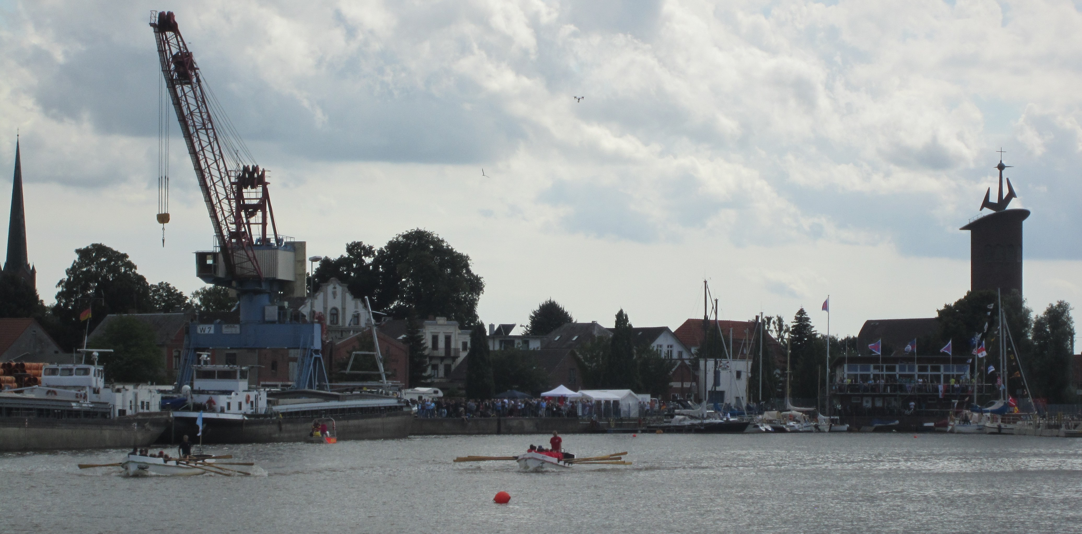 Ruderwettbewerb im Braker Binnenhafen während des Hafenfestes 2016